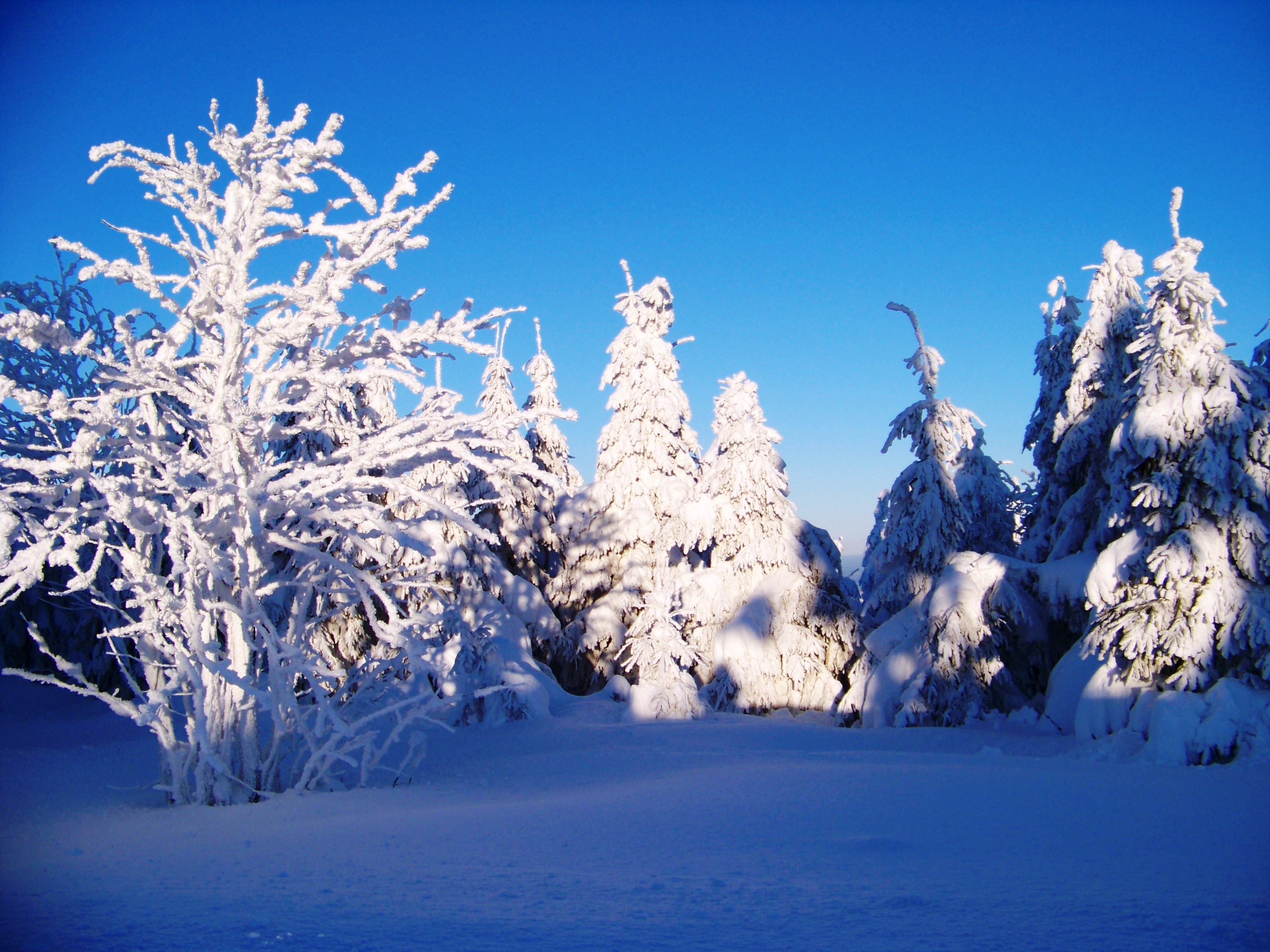 Wintereinbruch auf dem Fichtelberg, Naturschutzgebiet „Fichtelberg“ (NSG C98)